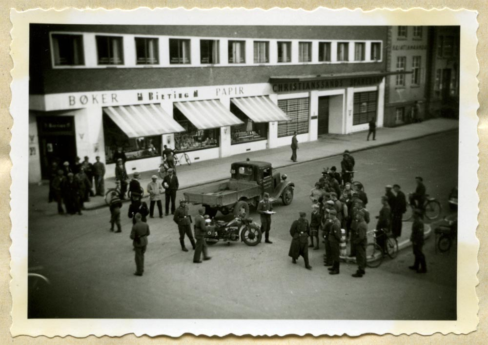 Trafikkuhell i Kristiansand 16. september 1941. Arkivreferanse: Statsarkivet i Kristiansand, Kristiansand politikammer, Norsk-tyske saker 1941, 1111, sak 668/41 PB.